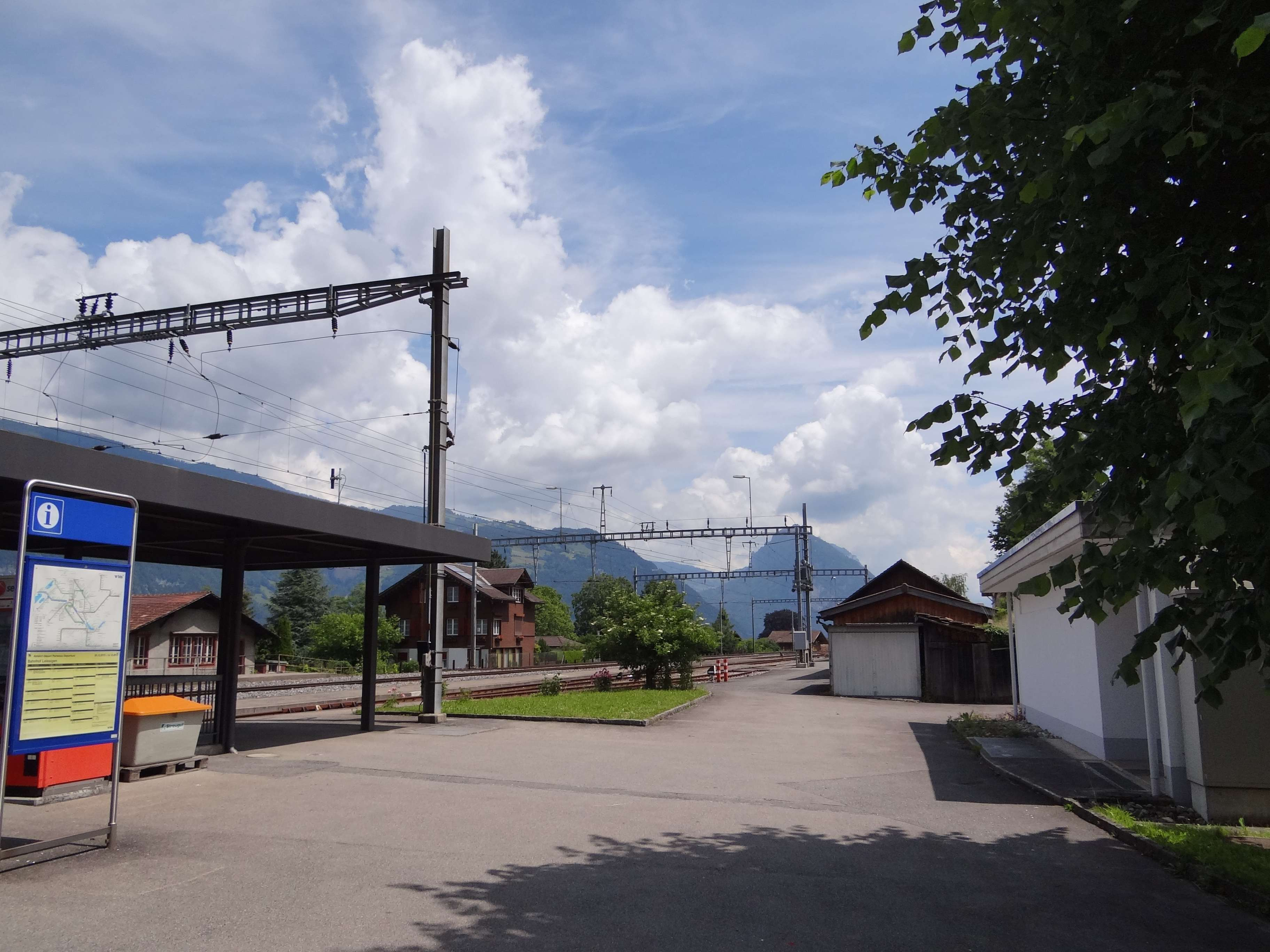 Leissigen, Switzerland